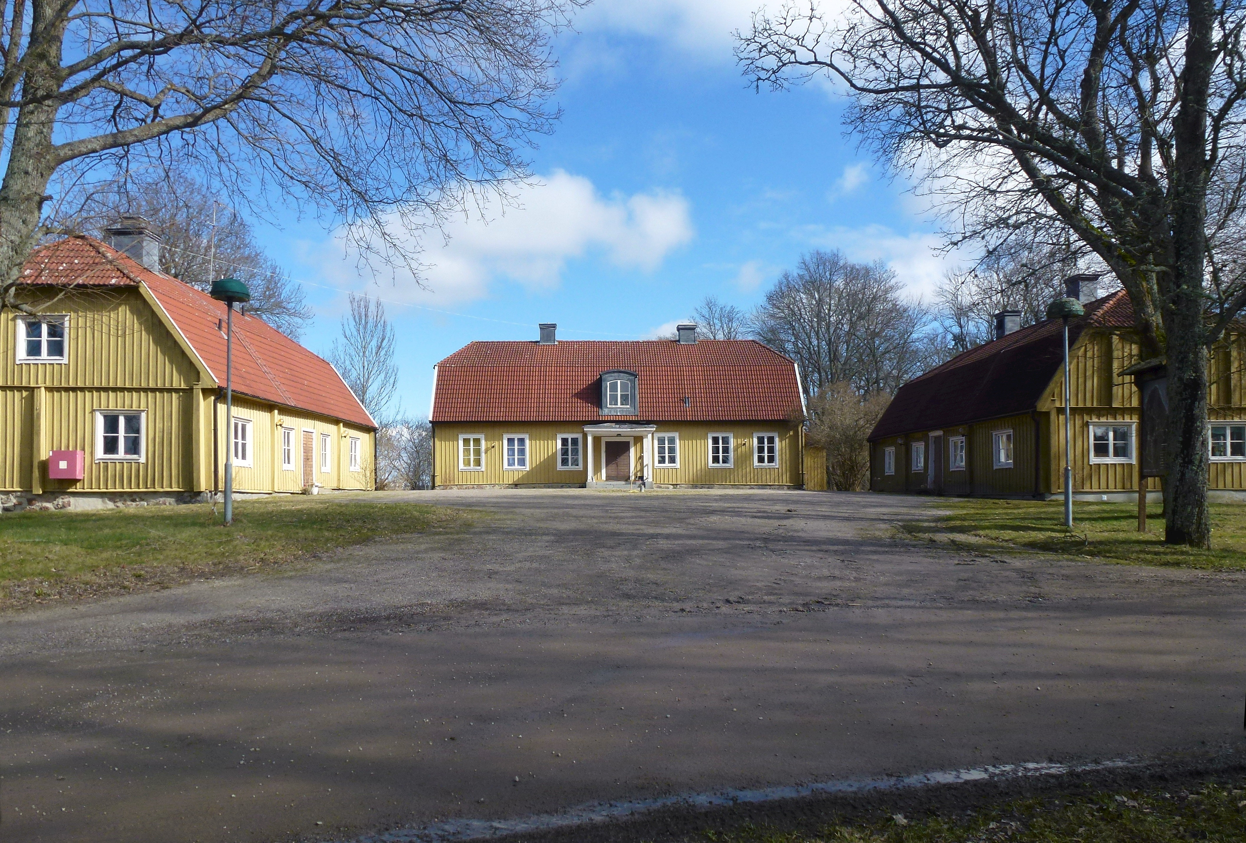 Skå Edeby, herrgården